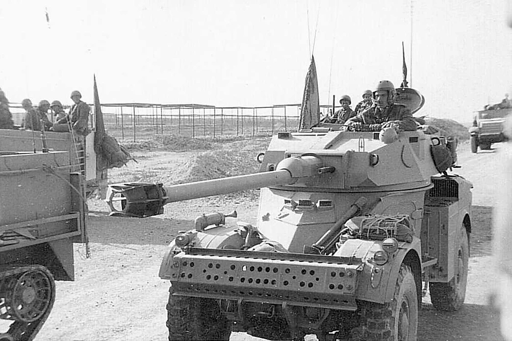 פעולת כראמה. בתנועה לגשר דמיה.